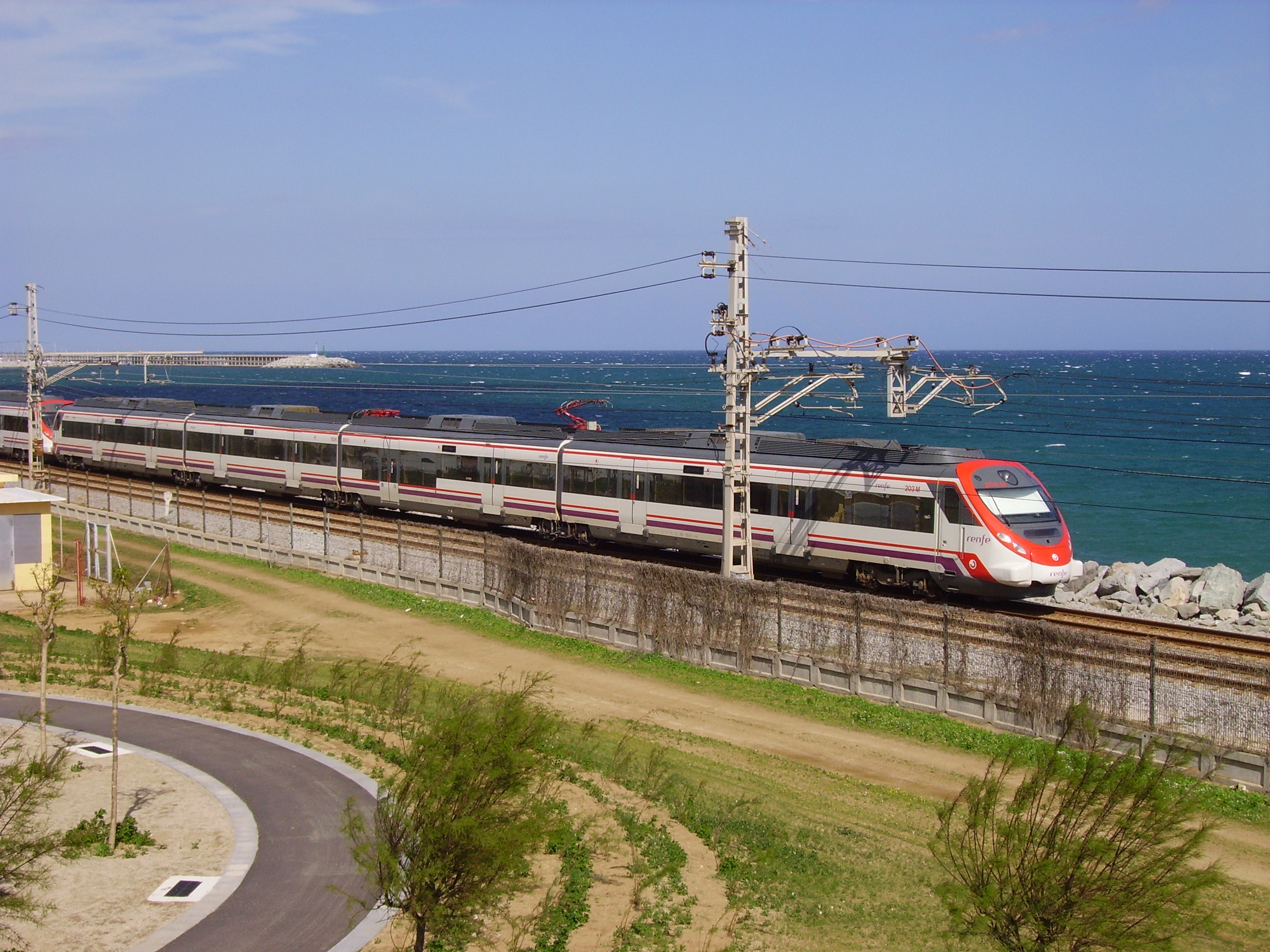 Un tren de rodalies al seu pas per Mataró, El Maresme, Catalunya.